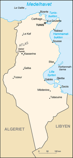 Carte de la Tunisie Source : CIA World Factbook (traduction) Historique de la carte originale Image:Tunisia_sm03.png *(suppr) (actu) 17 septembre 2005 à 20:28 . . Sting . . 330x710 (36001 octets) (Orthographe Libye) *(suppr) (rétab) 14 septembre 2004 à 16:36 . . Arnaudus . . 330x710 (32528 octets) (traduction française) *(suppr) (rétab) 14 septembre 2004 à 16:29 . . Arnaudus . . 330x710 (10770 octets) *(suppr) (rétab) 22 novembre 2003 à 16:51 . . Rinaldum . . 330x710 (12046 octets) (de en:)